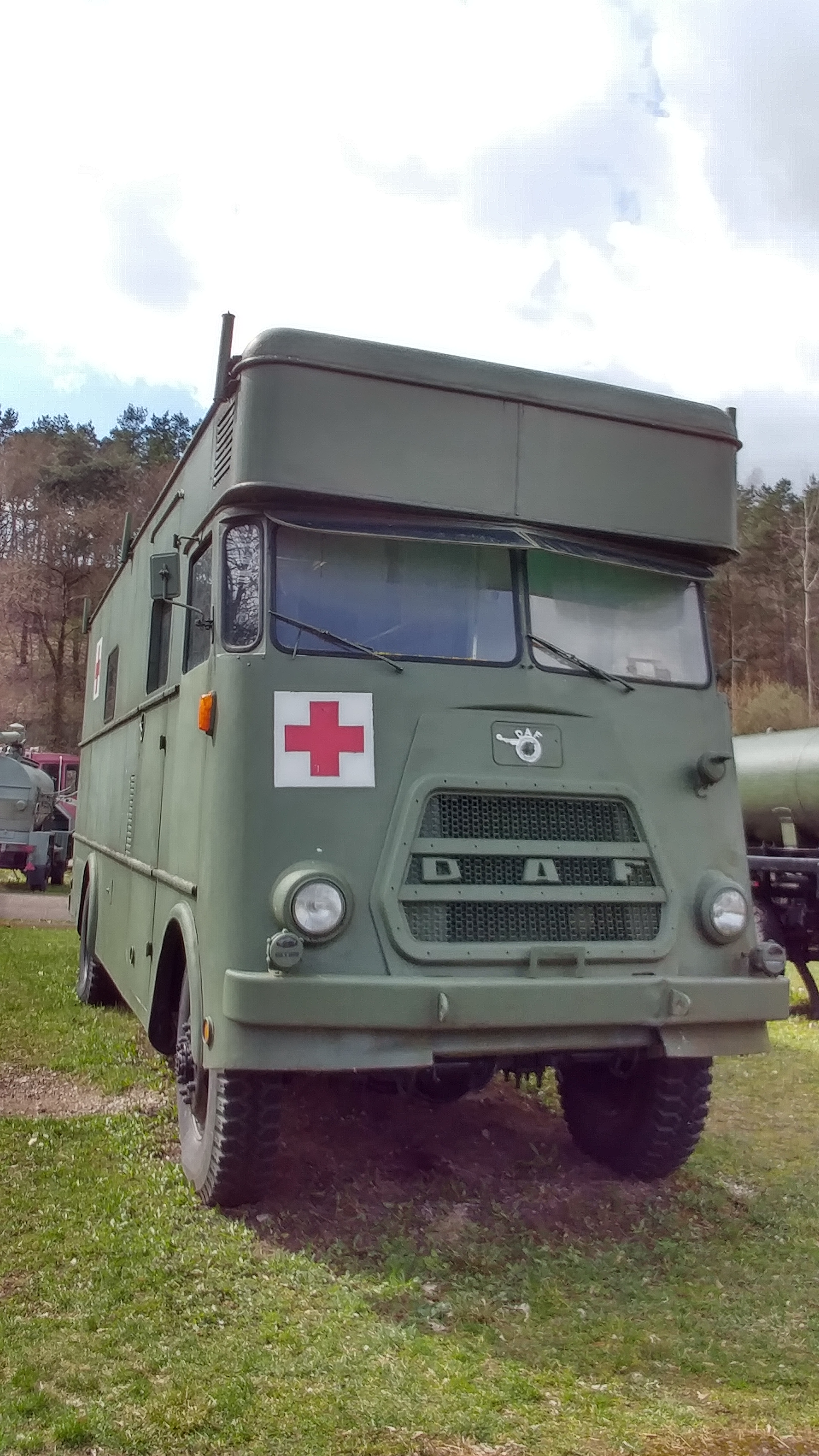 Фото сделано мной в 2017 году в Вильнюсе.